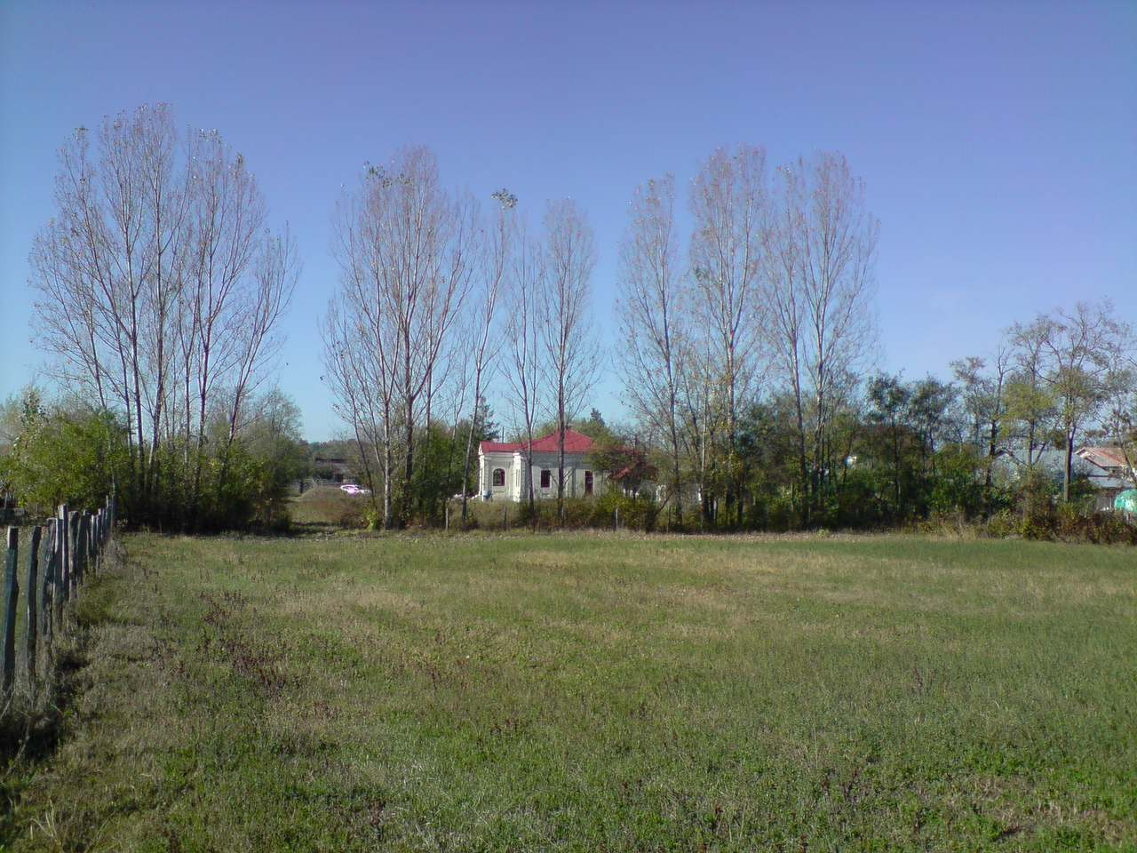 Casa este construita exclusiv cu caramizi arse, in numar de peste 1 milion. Zidurile exterioare au peste 65 cm grosime.